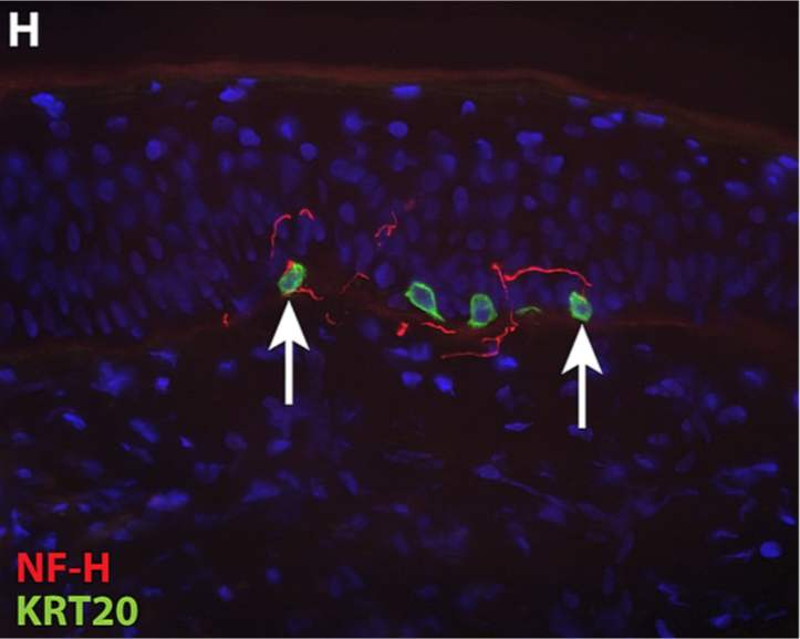 Fig. 9. Las células de Merkel en el ESS injertado se asocian con neuronas de expresión de neurofilamento pesado (NF-H), a las ocho semanas después del injerto. La inmunoquímica con anticuerpos contra NF-H (rojo) se usó para localizar neuronas y KRT20 (verde) para células de Merkel, en ESS después del injerto a ratones. Los núcleos se contratiñeron con DAPI (azul). H) Se muestra sección transversal de ESS a las 14 semanas después del injerto. Las flechas blancas indican ejemplos de nervios positivos para NF-H, asociados con o muy cerca de las células de Merkel; las flechas amarillas indican nervios positivos para NF-H no asociados con las células de Merkel.